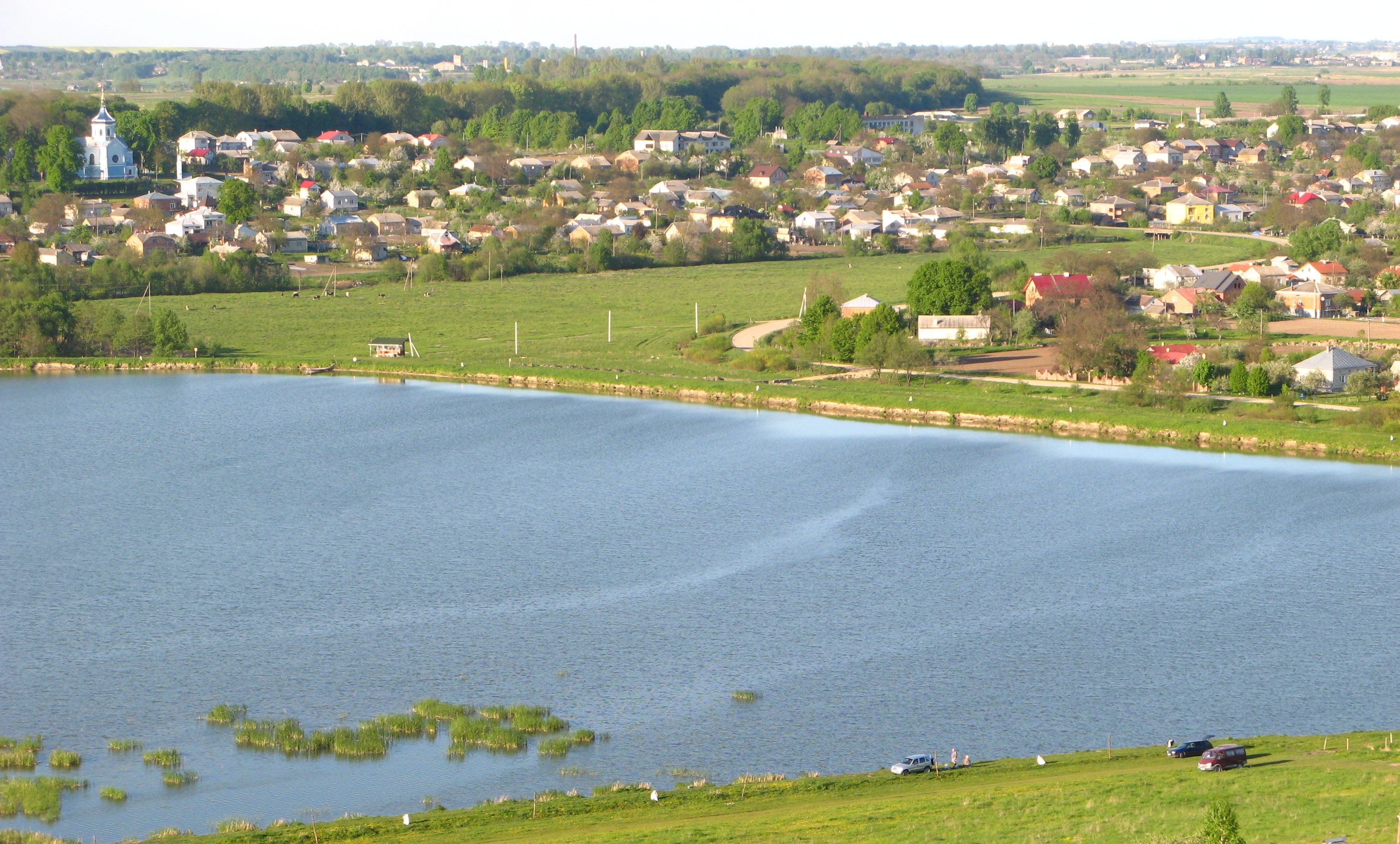 с. Зашків (Жовківський район)